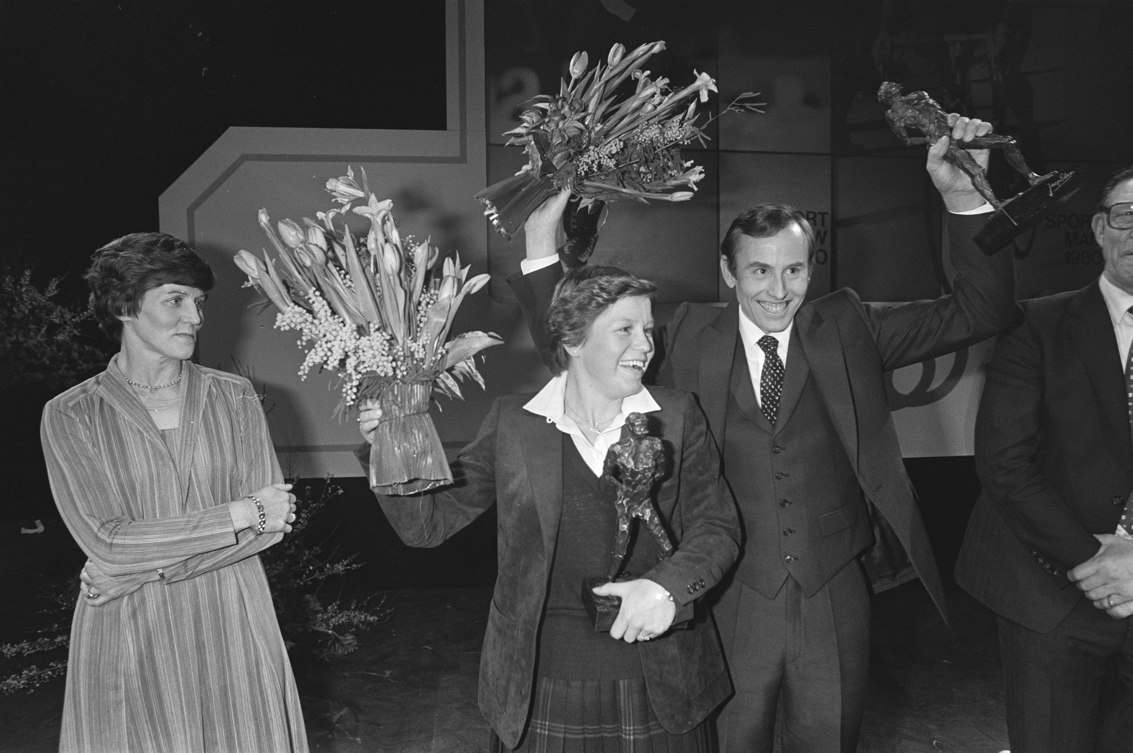 Collectie / Archief : Fotocollectie Anefo Reportage / Serie : [ onbekend ] Beschrijving : Vanavond is in Amersfoort de sportman en sportvrouw van 1 gekozen, sportvrouw is schaatster Annie Borckink en sportman wielrenner Joop Zoetemelk Datum : 8 januari 1981 Locatie : Amersfoort Trefwoorden : sportmannen, sportvrouwen, wielrenners Persoonsnaam : Annie Borckink, Zoetemelk, Joop Fotograaf : Dijk, Hans van / Anefo Auteursrechthebbende : Nationaal Archief Materiaalsoort : Negatief (zwart/wit) Nummer archiefinventaris : bekijk toegang 2.24.01.05 Bestanddeelnummer : 931-2469